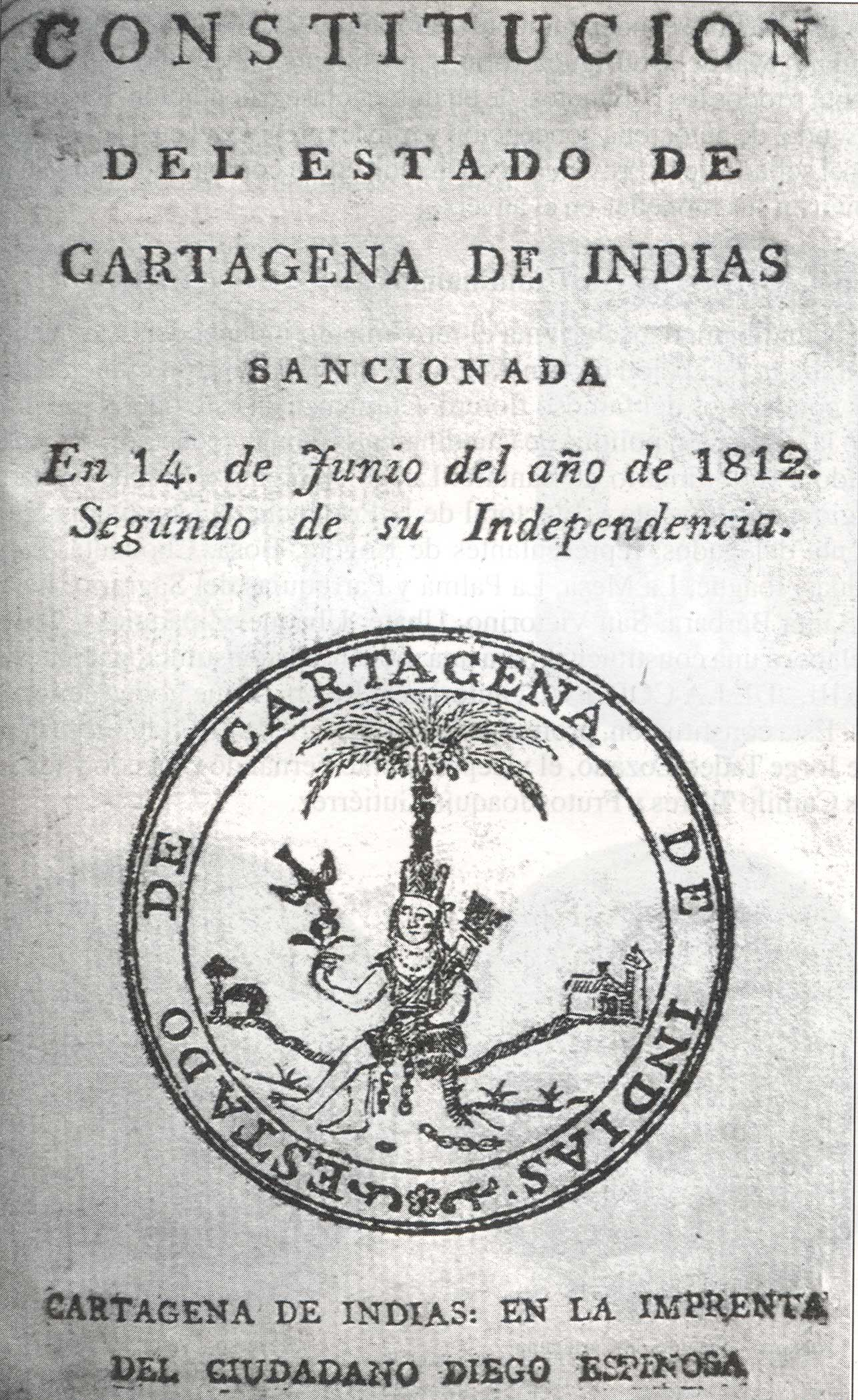 Constitución del Estado Libre de Cartagena de 1812